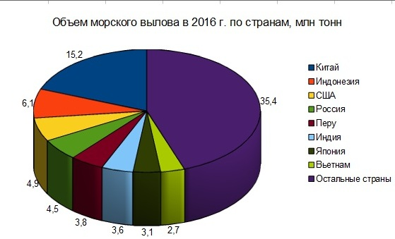 По данным ФАО